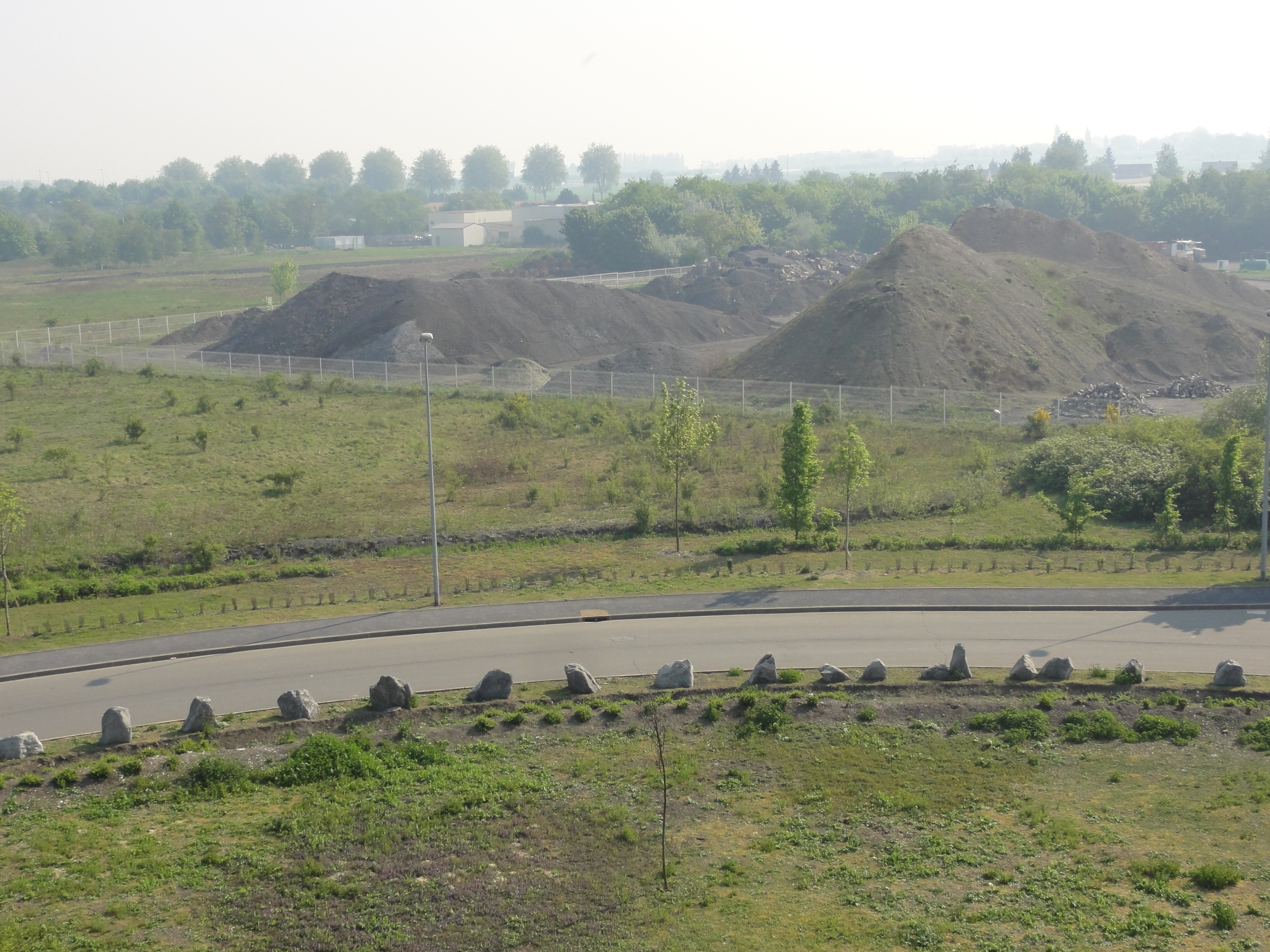 Terril n° 126 dit Saint Louis, disparu, fosse Saint-Louis de la Compagnie des mines d'Aniche dans le bassin minier du Nord-Pas-de-Calais, Somain, Nord, Nord-Pas-de-Calais, France.